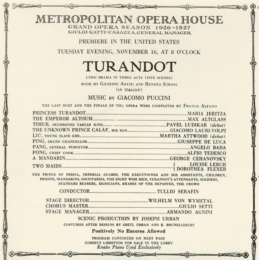 Operní program premiéry Pucciniho opery Turandot v Metropolitní opeře.